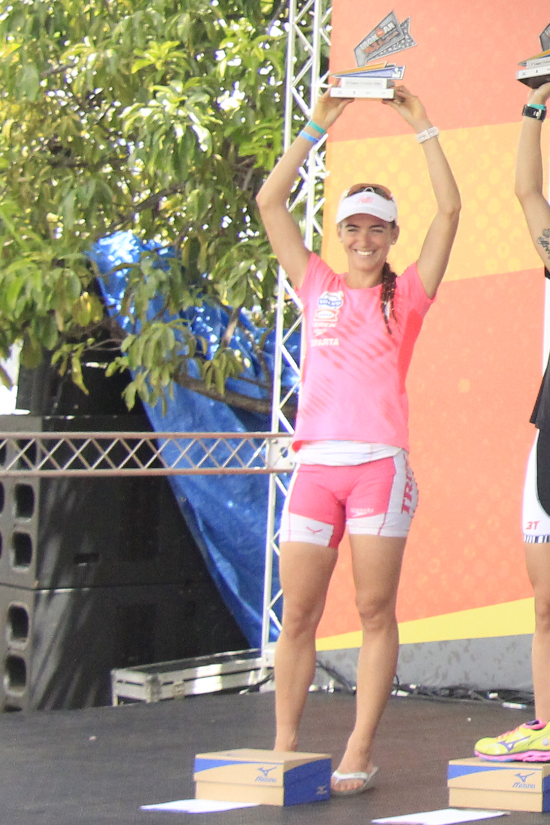 Valentina Carvallo at Ironman 70.3 Brasil 2014